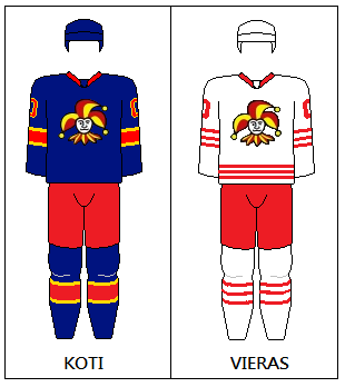 Peliasut 2016-17